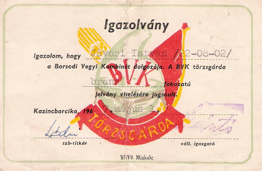 Jávori István bronz fokozatú törzsgárda igazolványa 1967-ből. A Borsodi Vegyi Kombinát dolgozó kaptak ilyen elismerést (egy hozzá tartozó jelvénnyel együtt) 5 év folyamatos kiváló munka után.